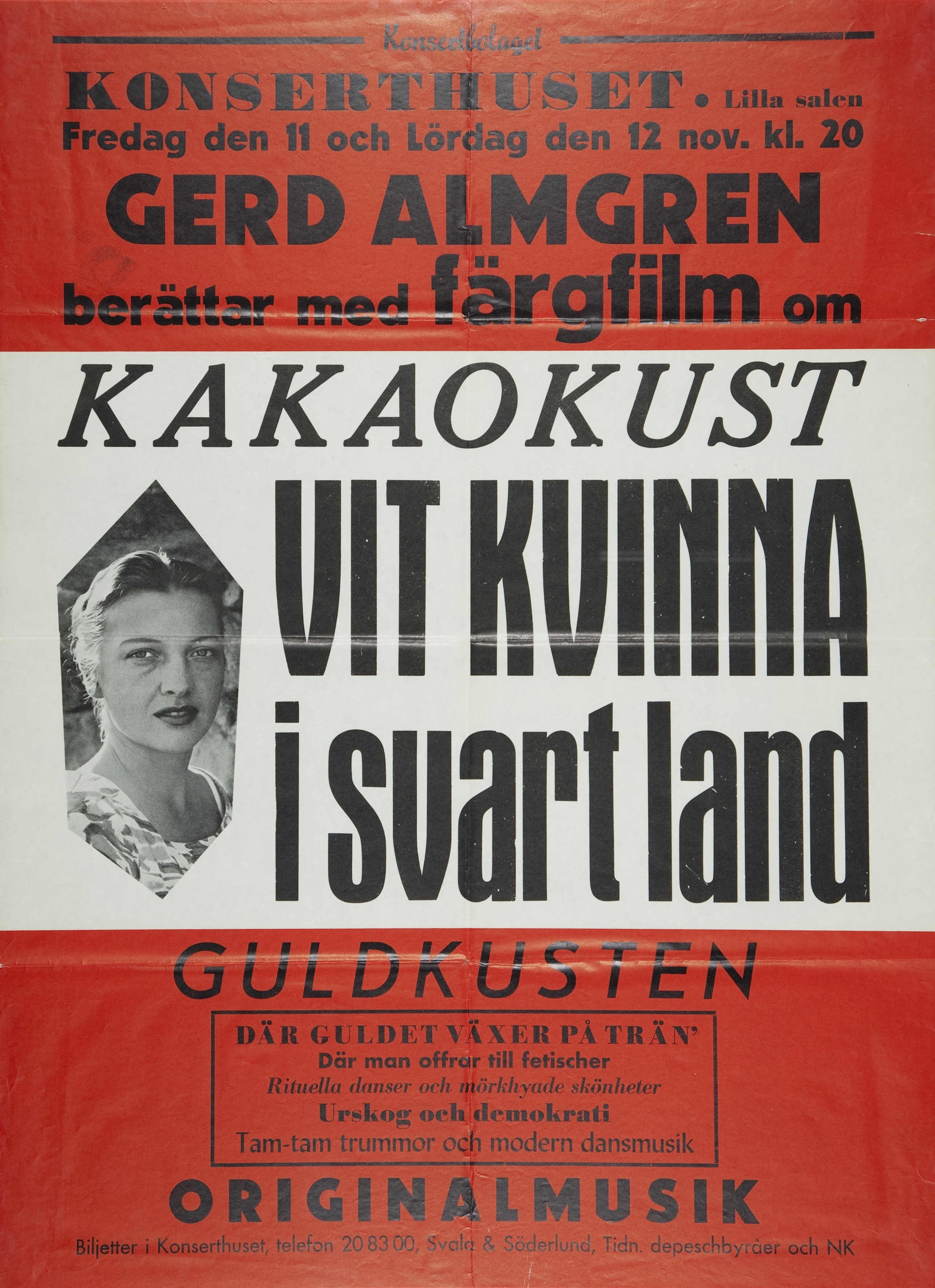 Affisch till Gerd Almgrens presentation av sin film Kakaokust 1955.